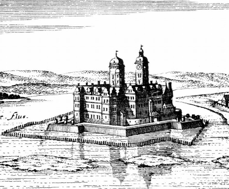 Ausschnitt aus dem Kupferstich von Wolgast von Merian.